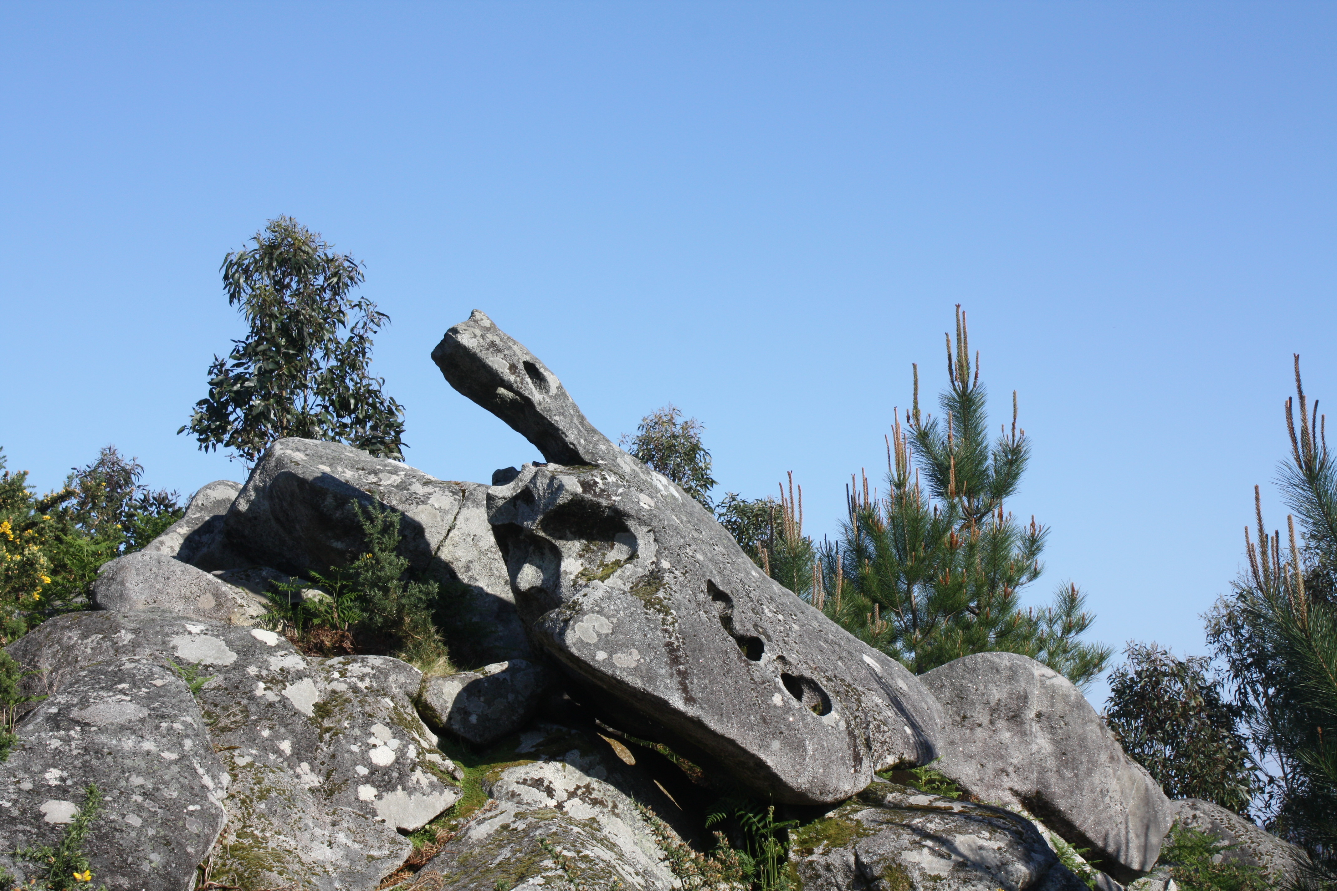 Con da Tartaruga, no Outeiro do mesmo nome, en Samieira (Poio, Pontevedra)